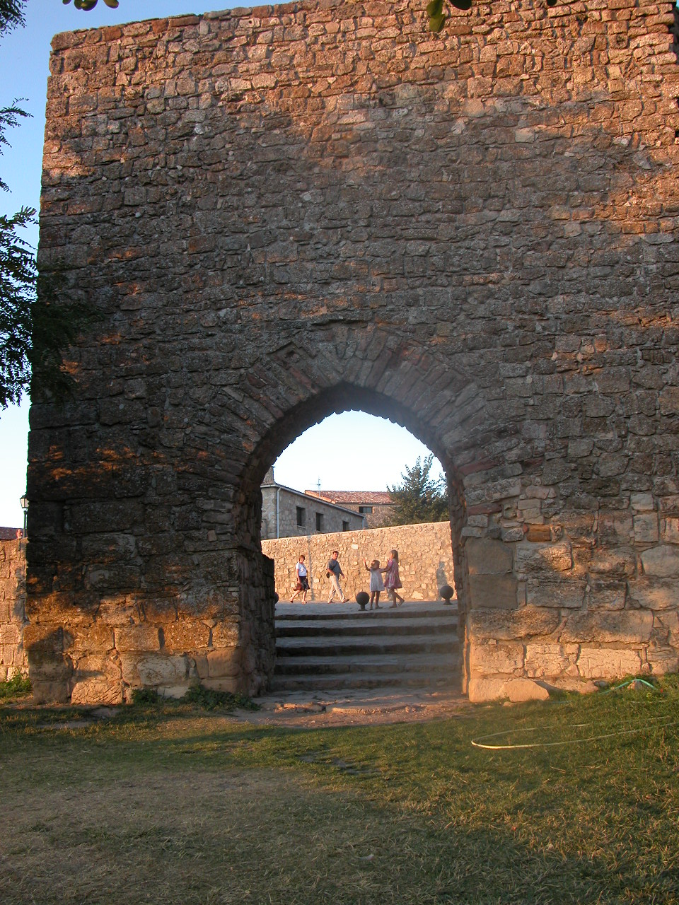 Puerta arabe, Medinaceli, Soria, España